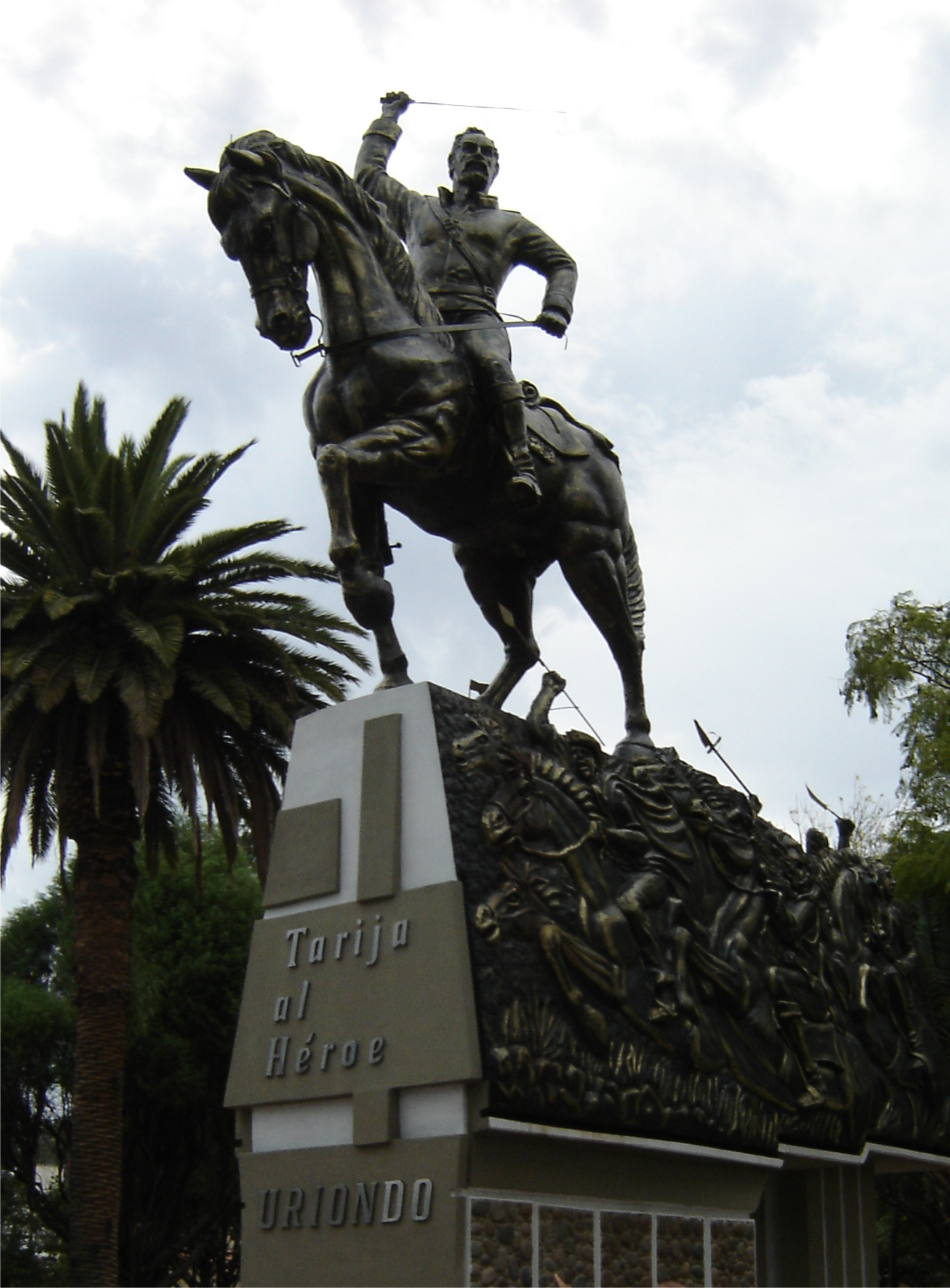 Foto del Monumento a Francisco de Uriondo en Tarija